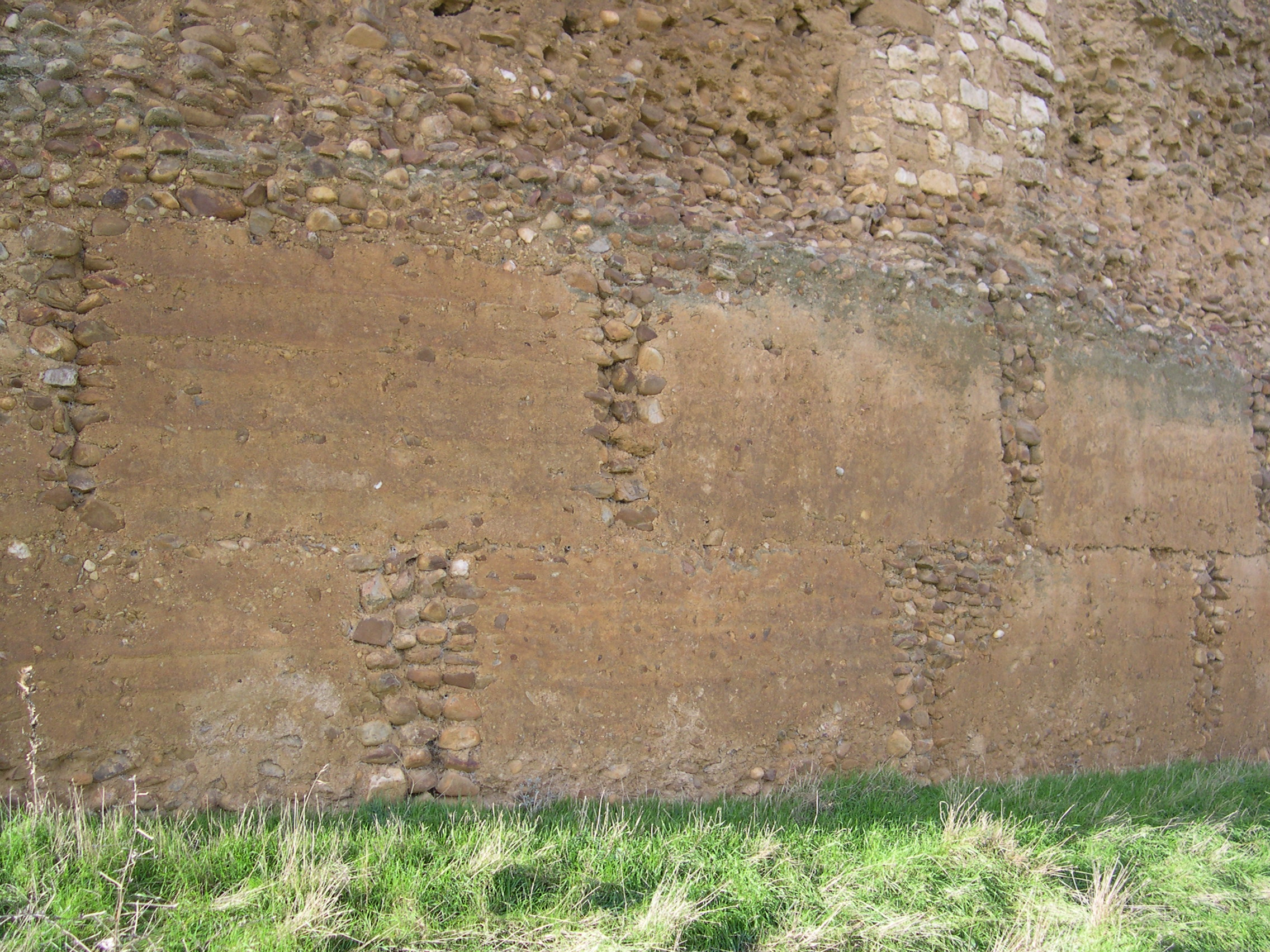 tapial del castillo de San Pedro de Latarce